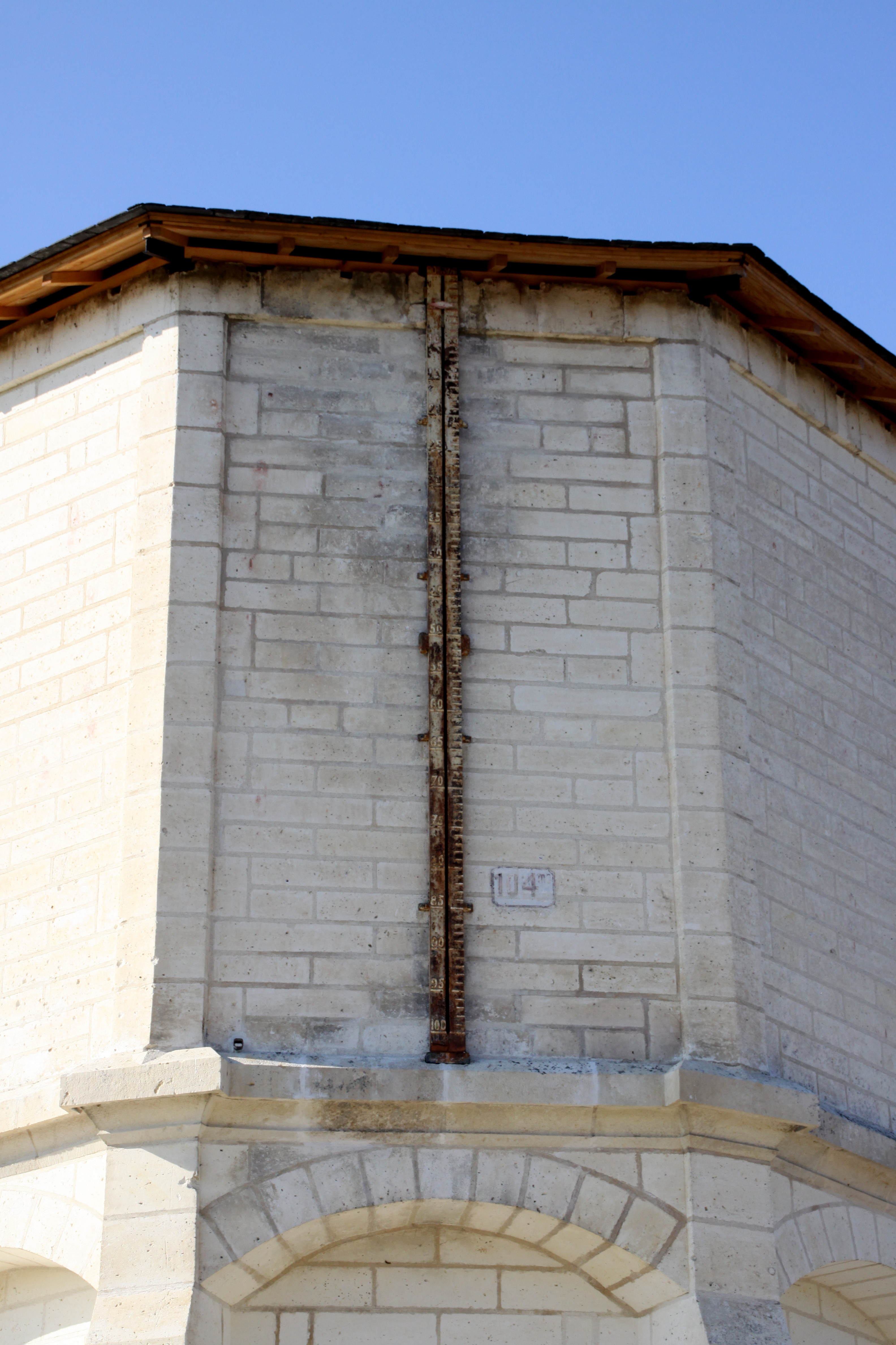 Waassertuerm an der Gare vun Niversac mat Waasserstandsmeter